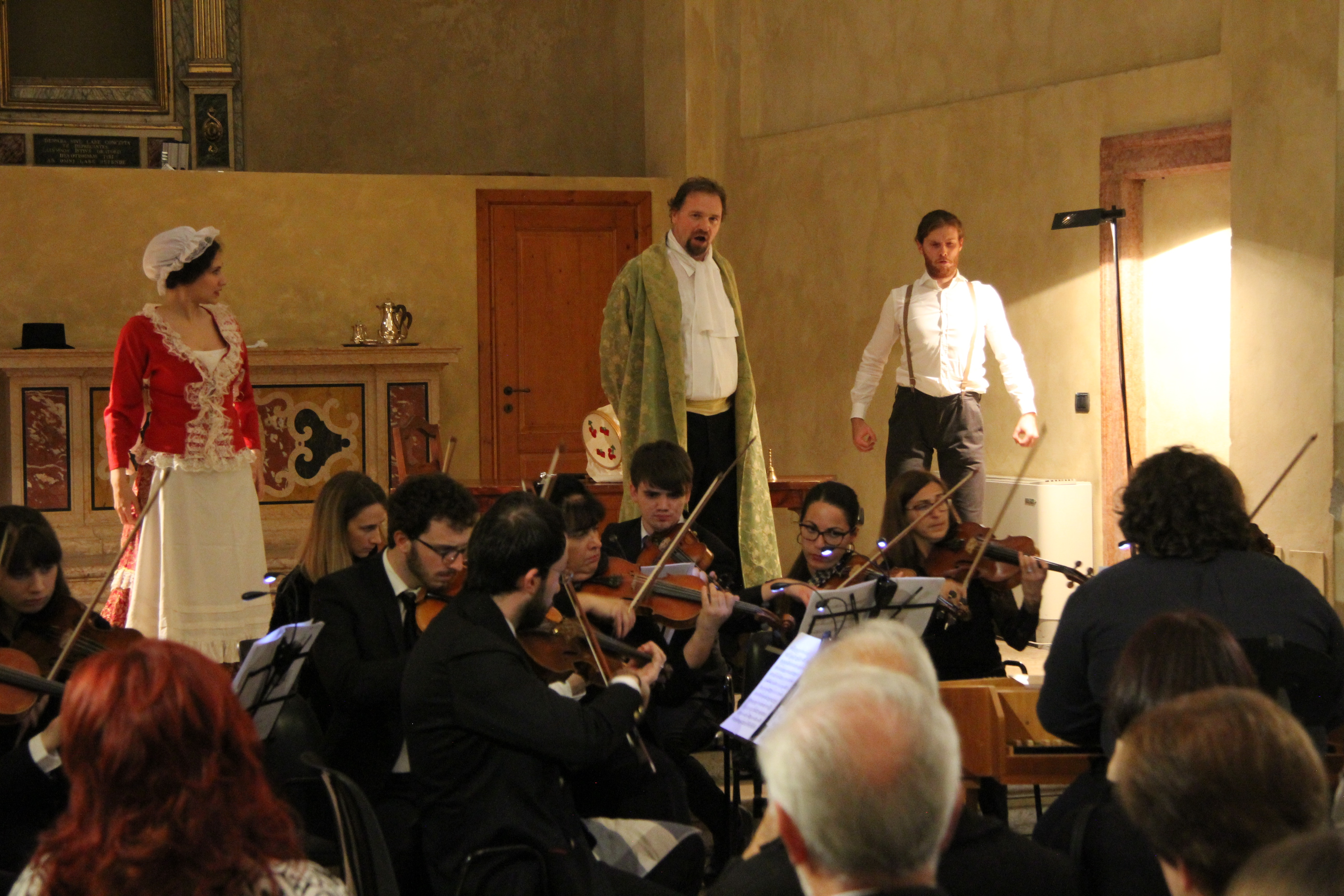 Une scène tirée de La serva padrona de G. B. Pergolesi, mise en scène à Vérone et dirigée au clavecin par F. Mazzoli